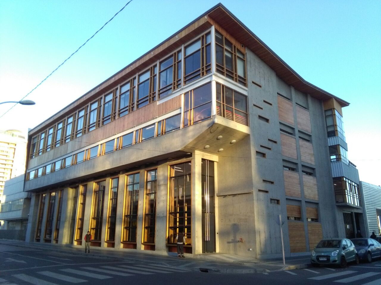 Edificio CIAE UV Centro Integral de Atención Estudiantil Universidad de Valparaíso Calle Blanco 951, Valparaíso, Chile